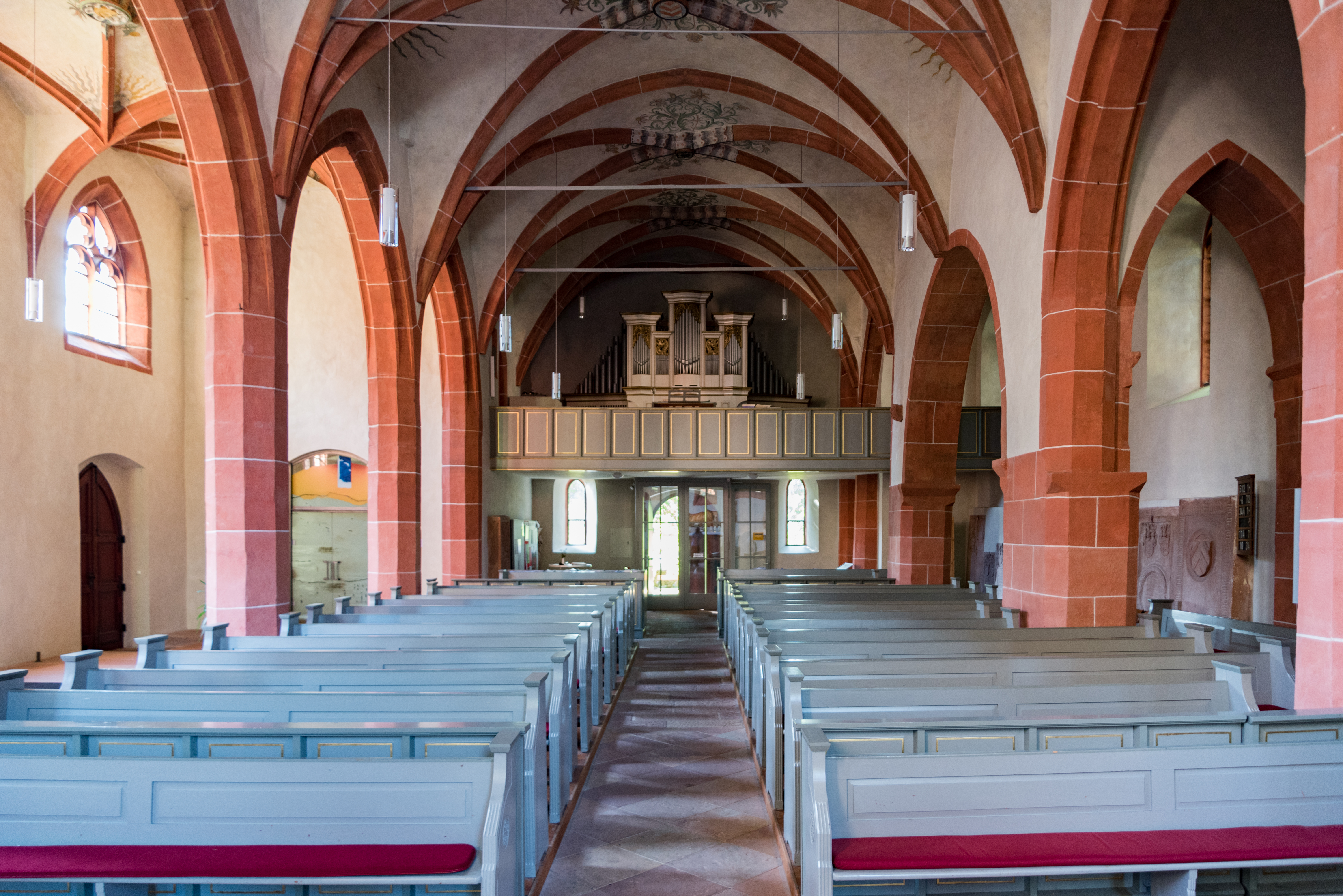 Ortenberg, Schloßplatz 4, Marienkirche